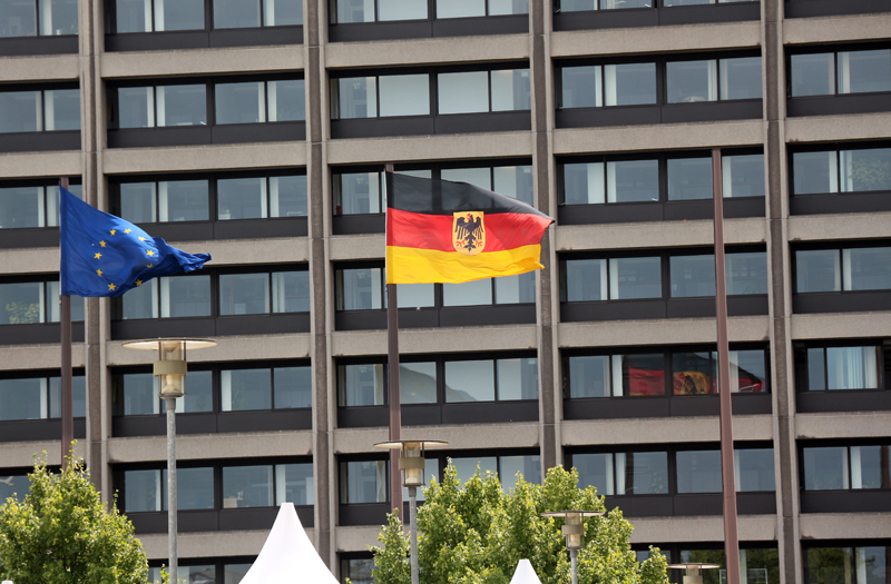 Europaflagge und Dienstflagge der Bundesbehörden vor der Deutschen Bundesbank-Zentrale in Frankfurt am Main